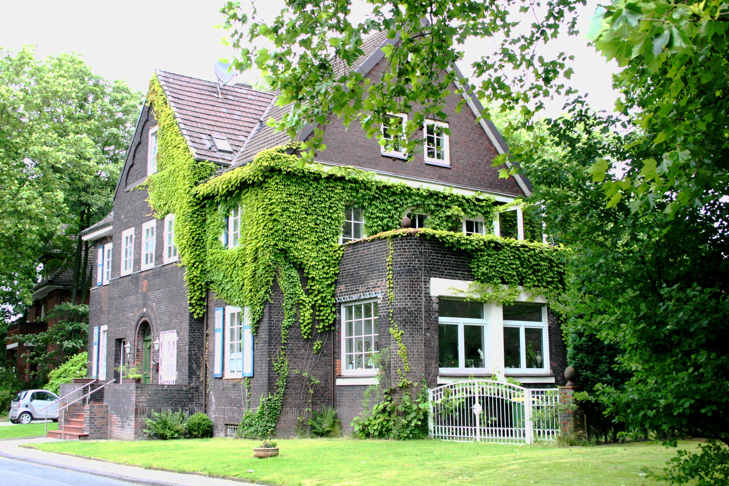 Siedlung Grafenbusch (Oberhausen): frei stehende Villa